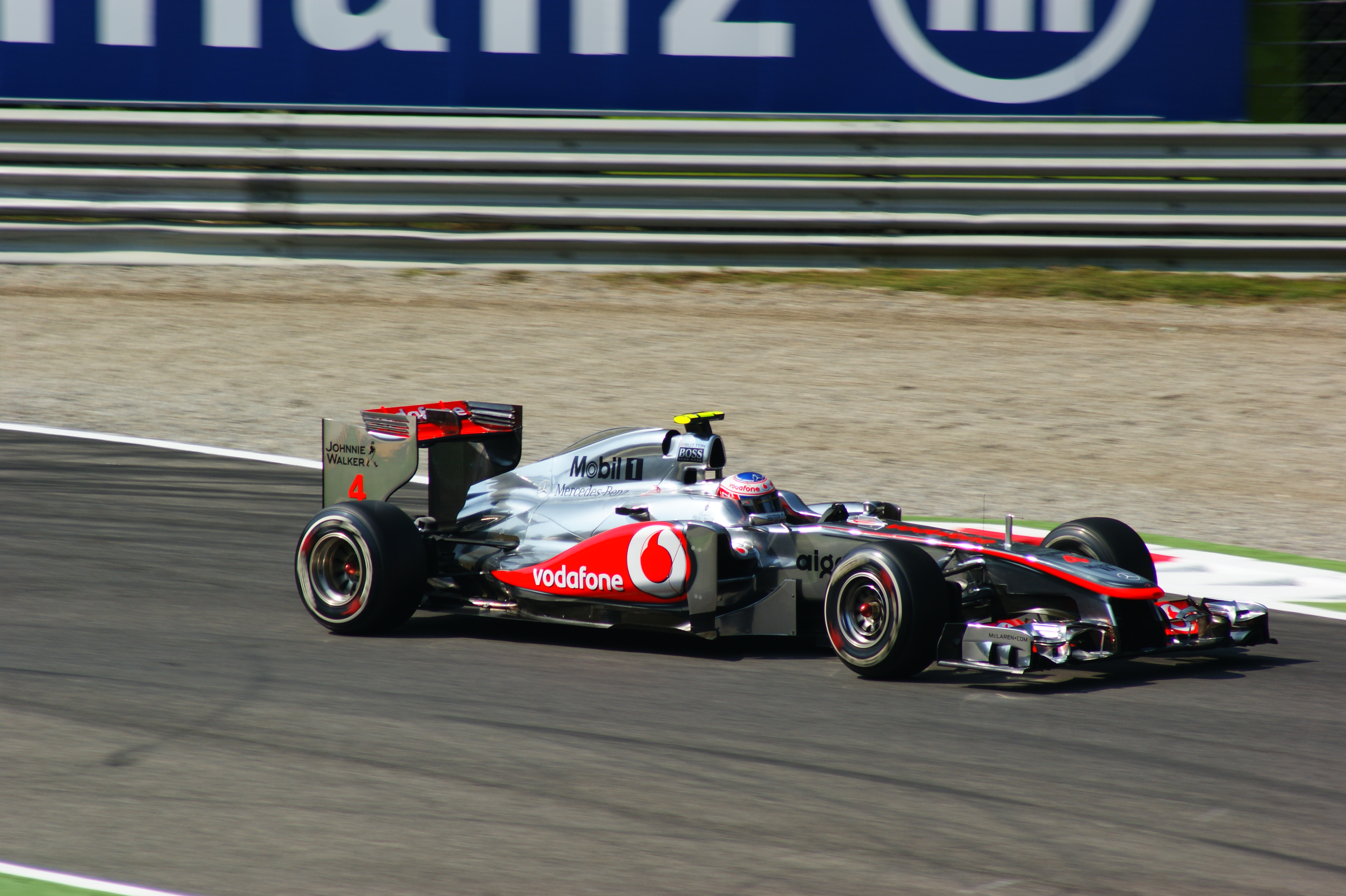 Jenson Button alla variante della roggia Monza 2011